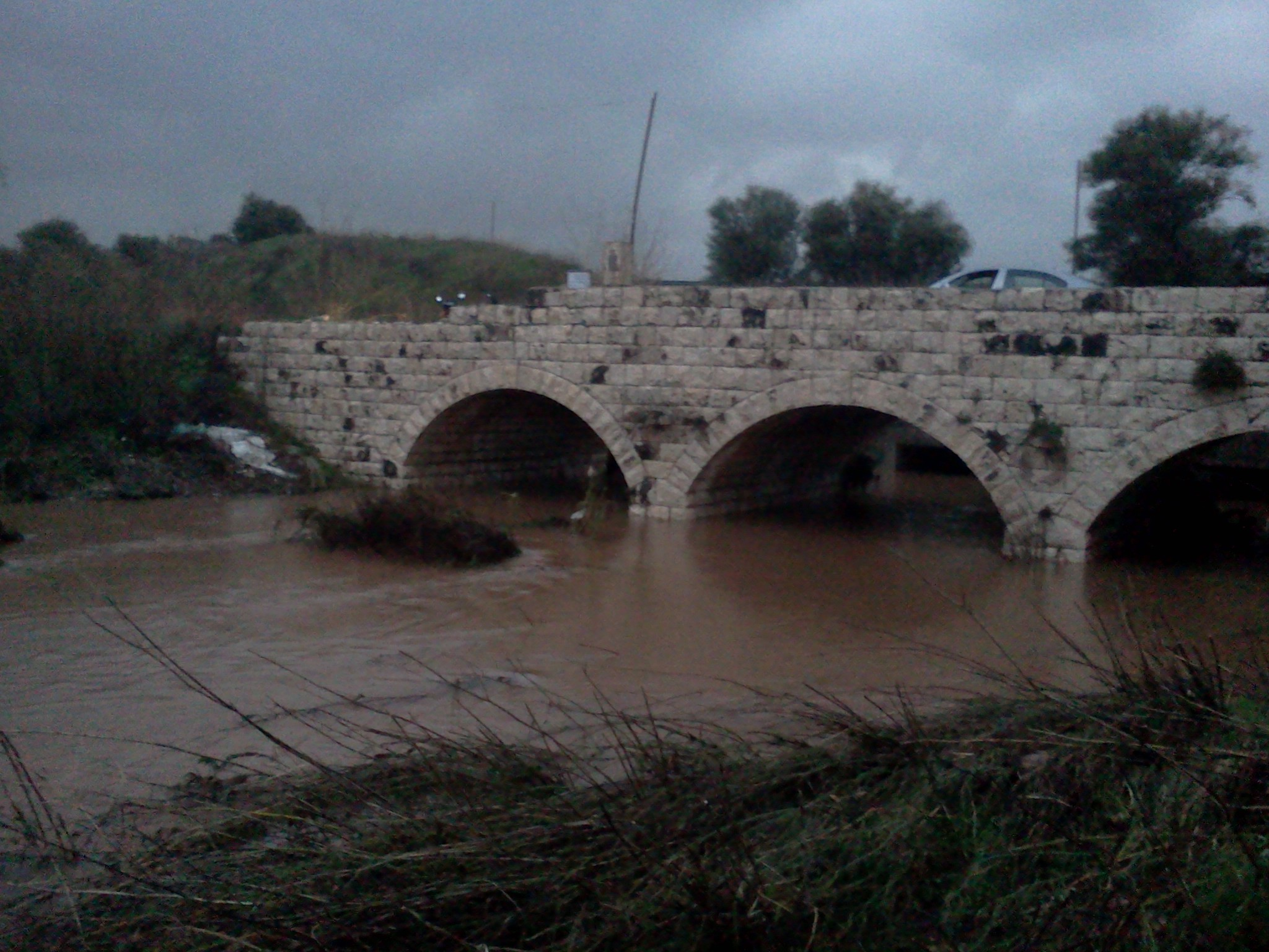 גשר בריטי על נחל בית עריף